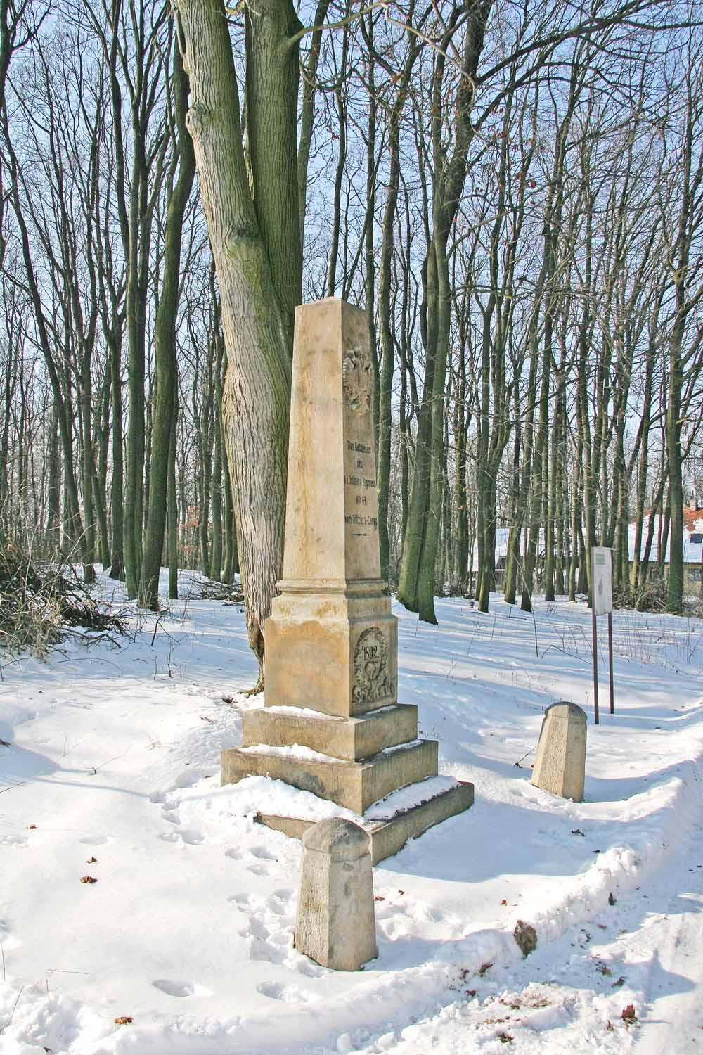 Pomník z války roku 1866